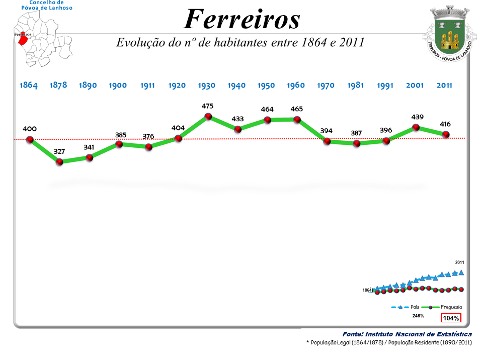 Censos 1864/2011